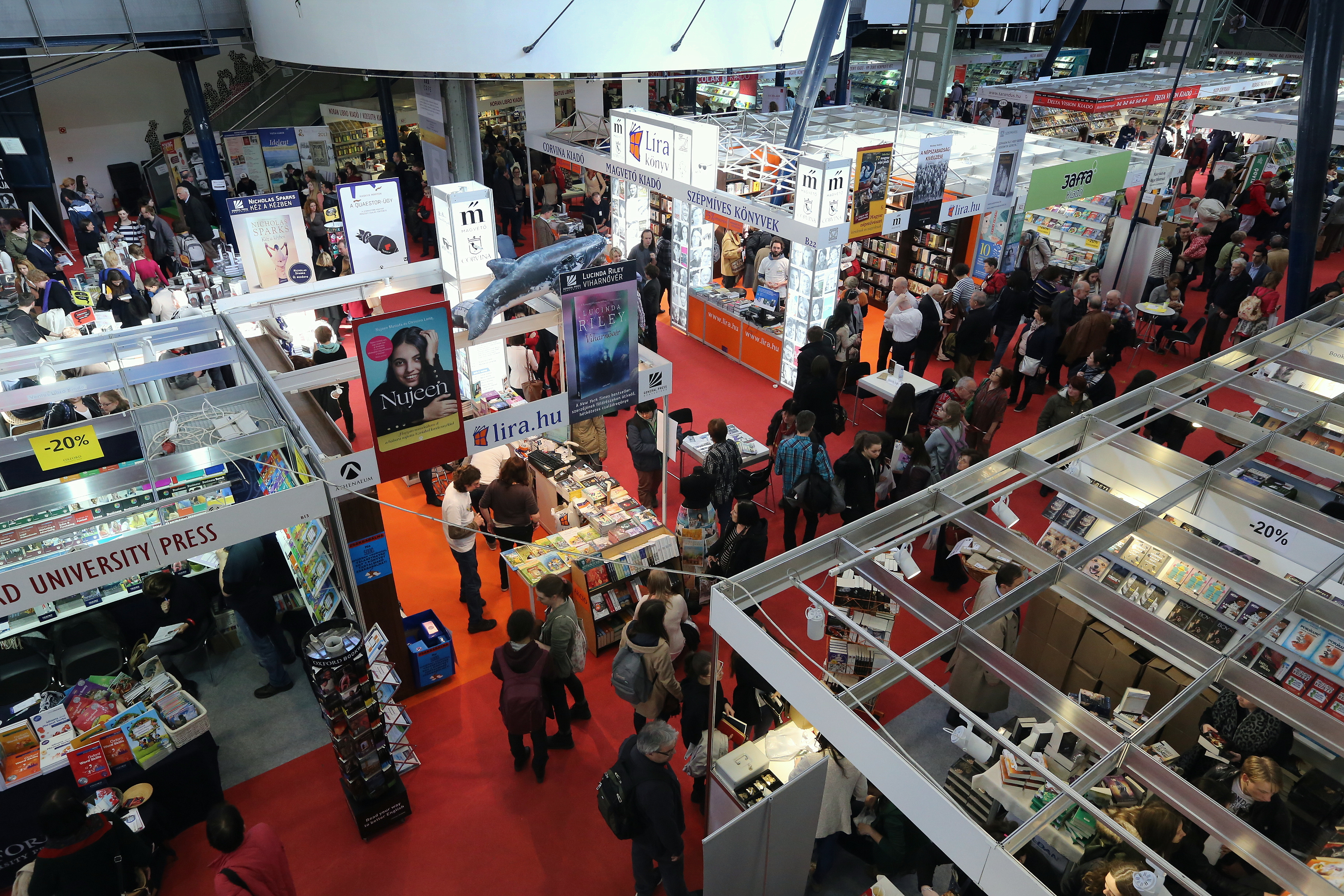 Budapesti Nemzetközi Könyvfesztivál 2017 the 24th International Book Festival Budapest to be held between 20–23 April, 2017.